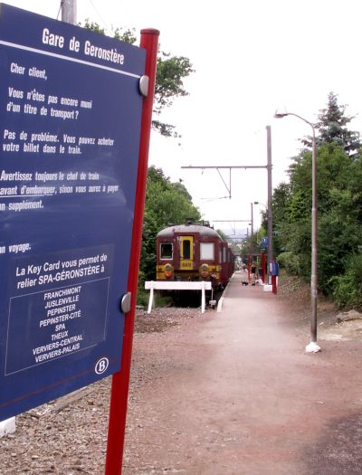 gare de geronstere